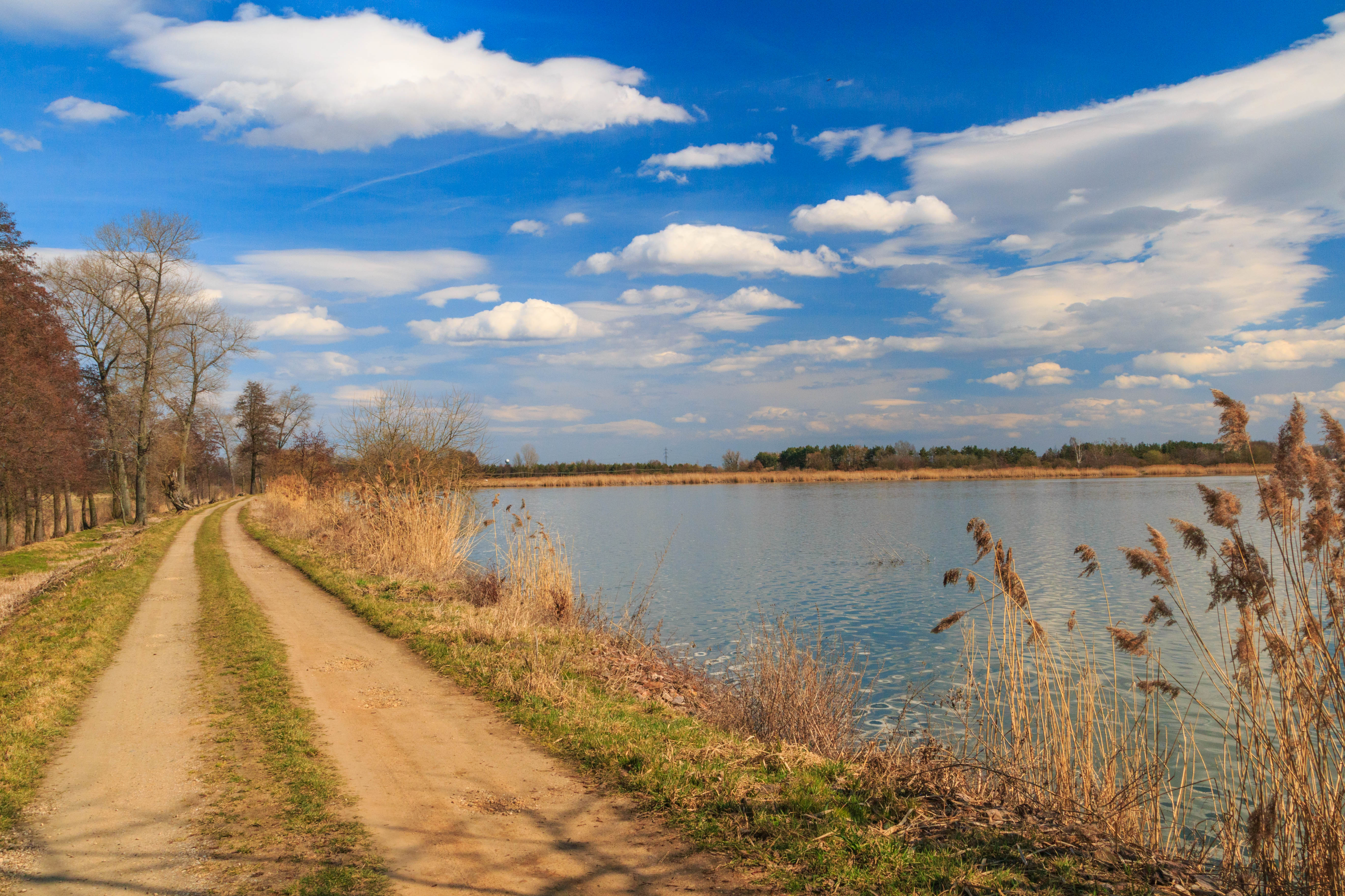 Třesický rybník Project: Vodstvo.